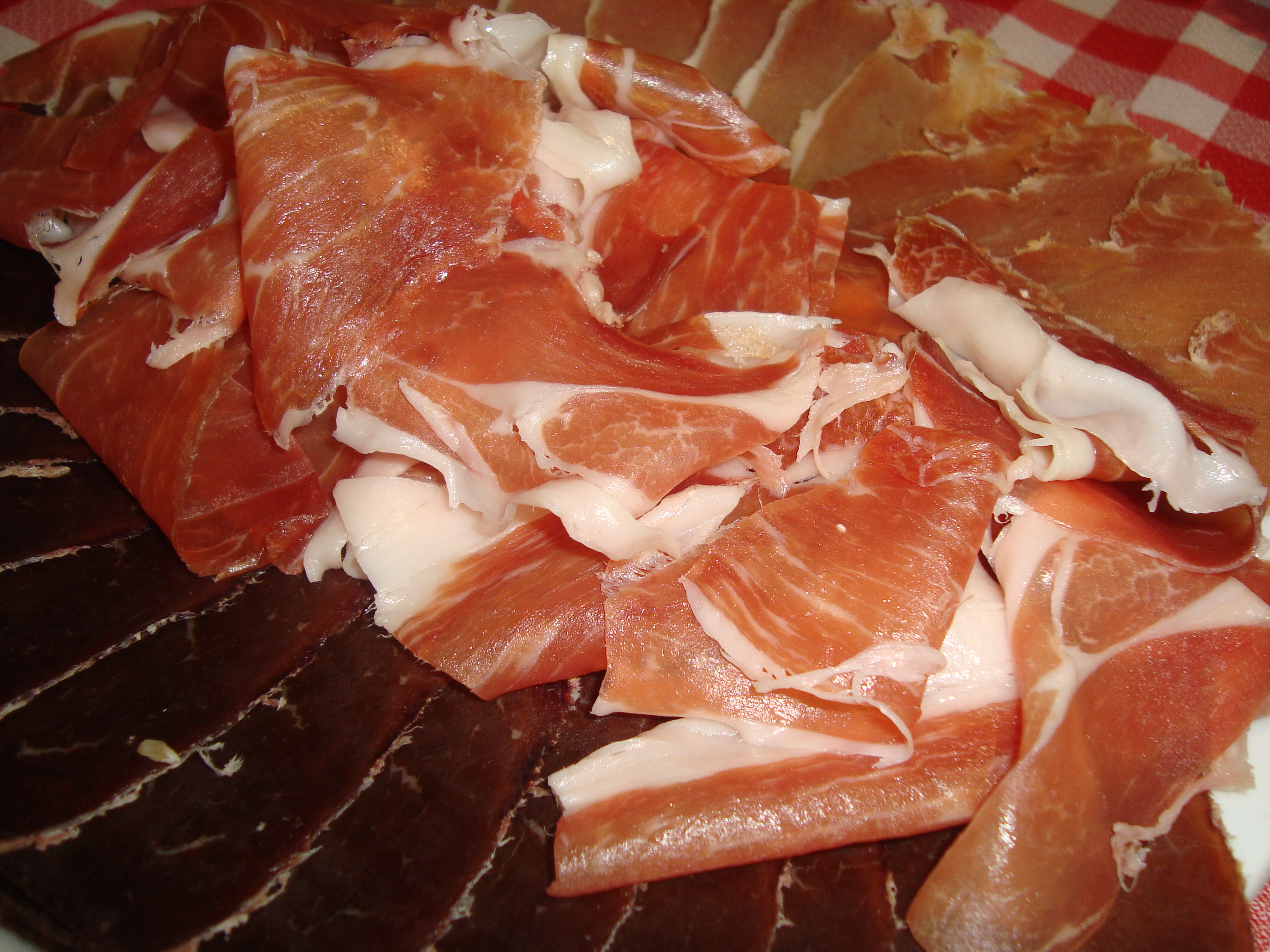 Lonchas de jamón, cecina y lomo, productos de Teruel